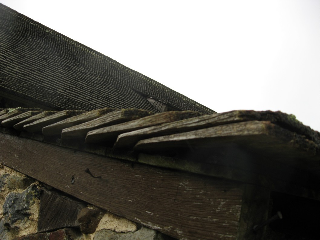 Closerie des Poiriers, toiture